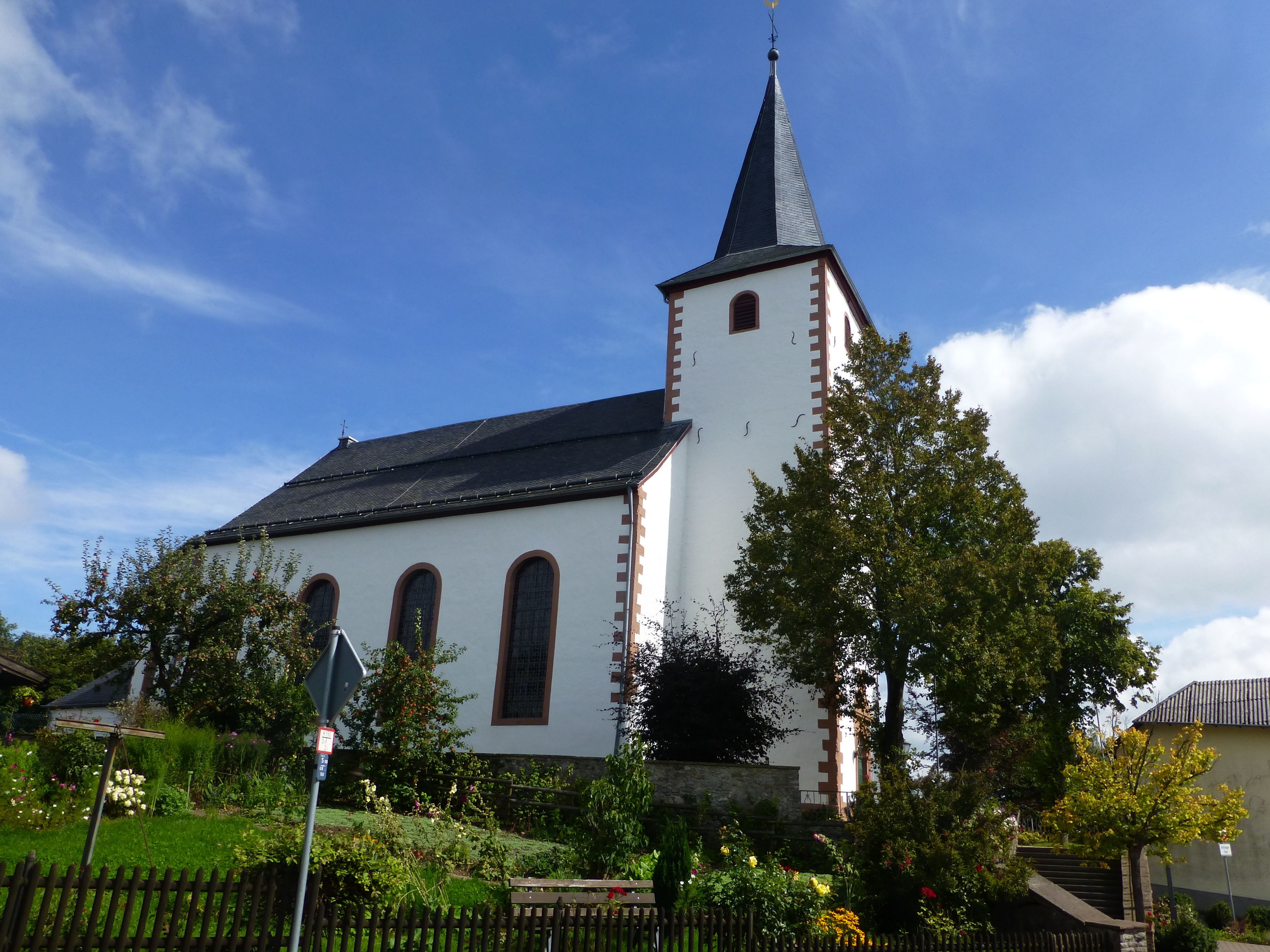 Tondorf – kath. Kirche St Lambertus